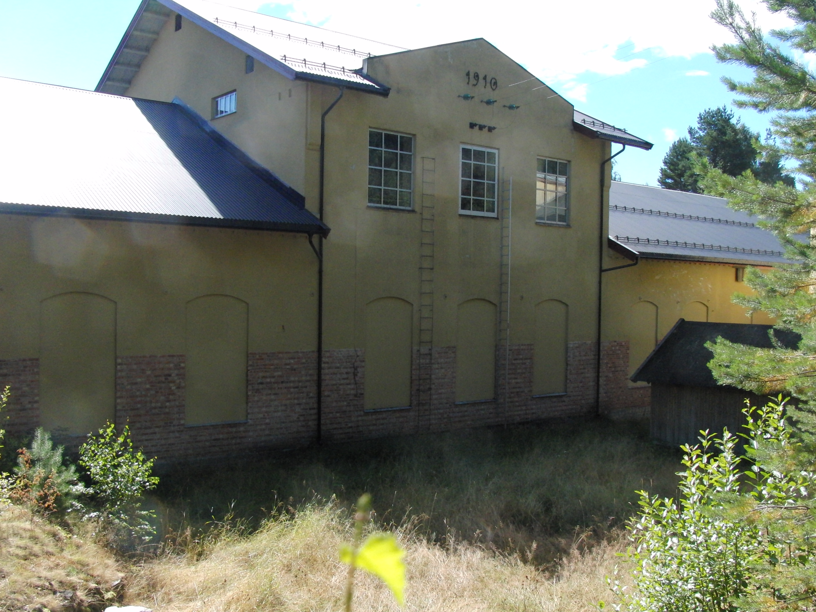 Skjefstadfoss I kraftverk